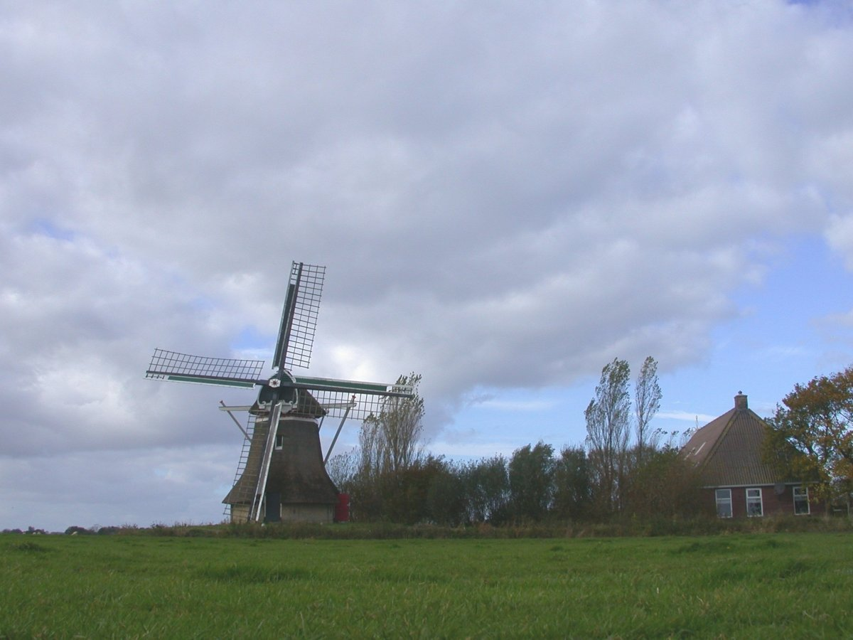 Genezareth-Kloosterpoldermolen/ Ten-Bruggencatenummer: 03046: Achtkante grondzeiler van voren gefotografeerd (opmerking: Foto gemaakt in het kader van het project Actualisering Monumentenregister (AMR).)